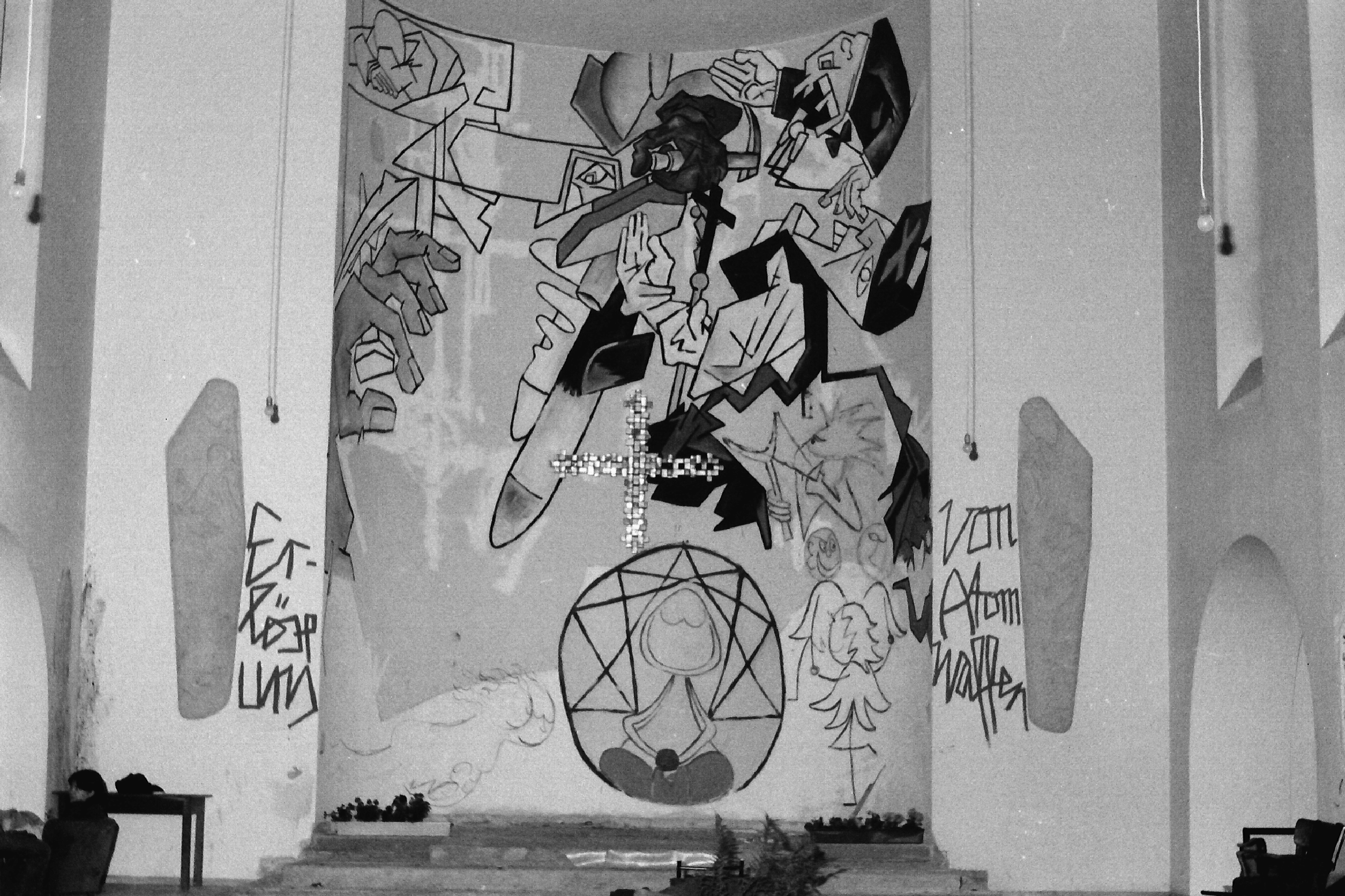 Wandbild von Klaus Paier In Aachen, Höverhaus vor dem Teilabriss